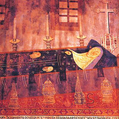 Maria Cron, deutschstämmige, stigmatisierte Nonne in Indien, Goa